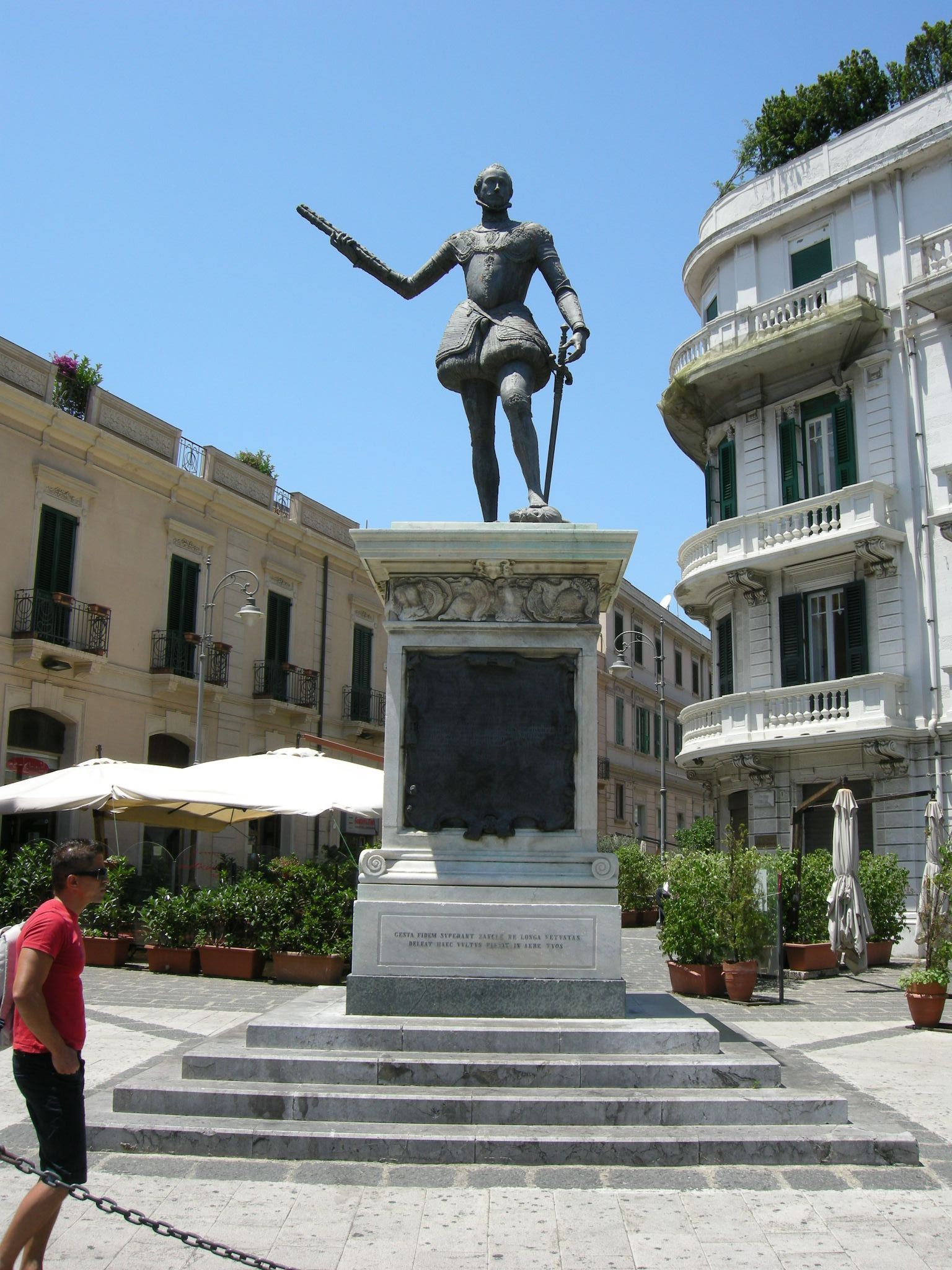 Messina, monumento a giovanni d'austria (1572) vincitore di lepanto